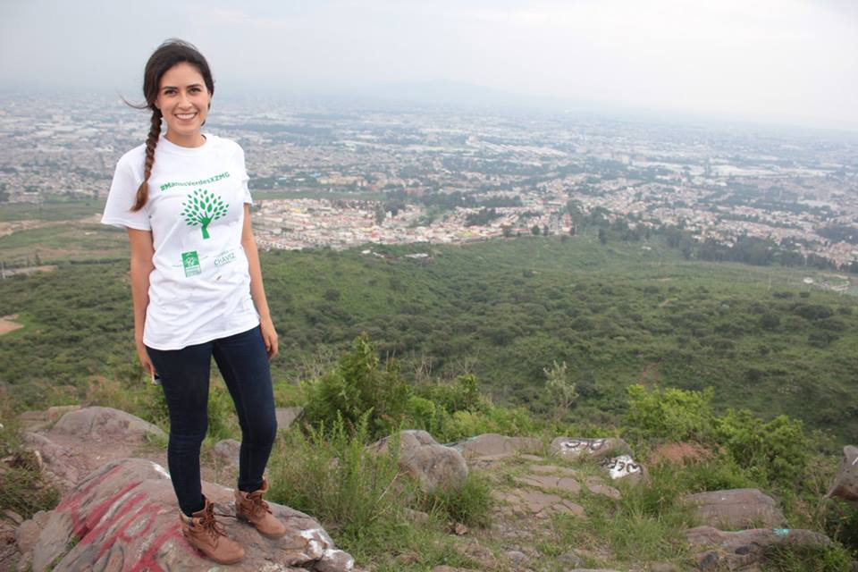 Dani Chávez en el cerro del 4